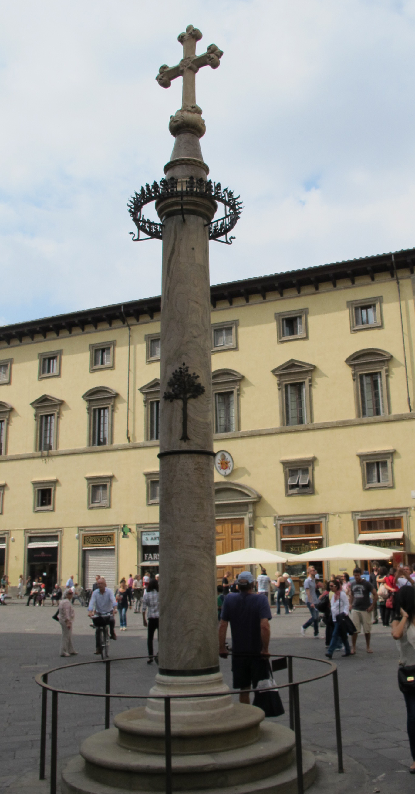 Colonna di s. zanobi, v